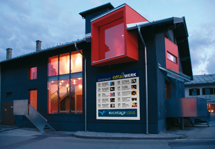 Emailwerk Seekirchen, Anton Windhager-Straße 7, 5201 Seekirchen, Österreich